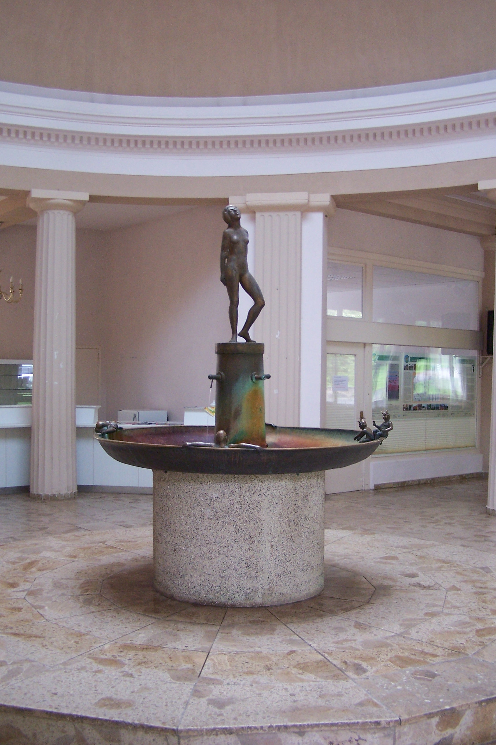 Sculptures in Bad Liebenstein